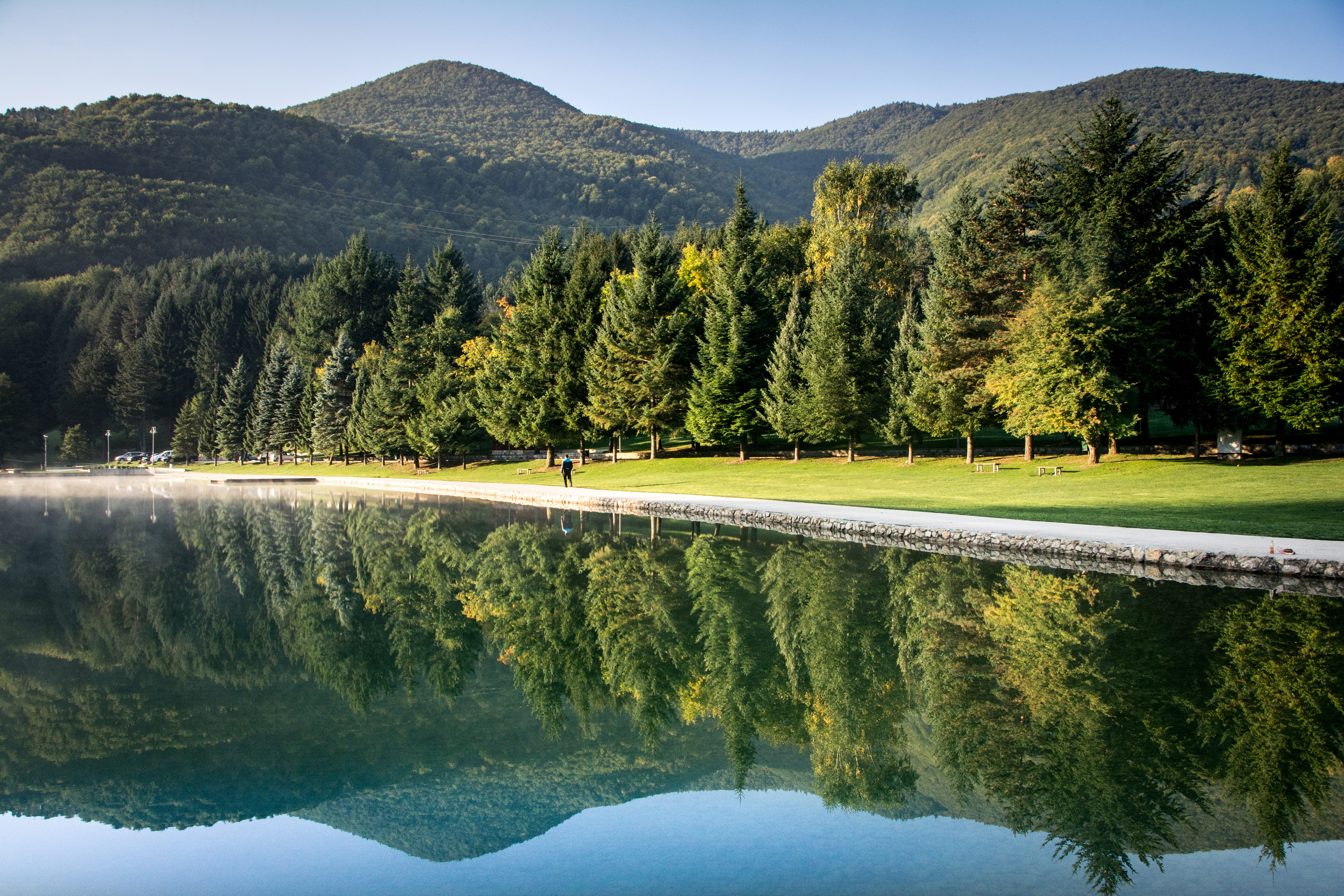 This image was uploaded as part of Trace of Soul 2018.